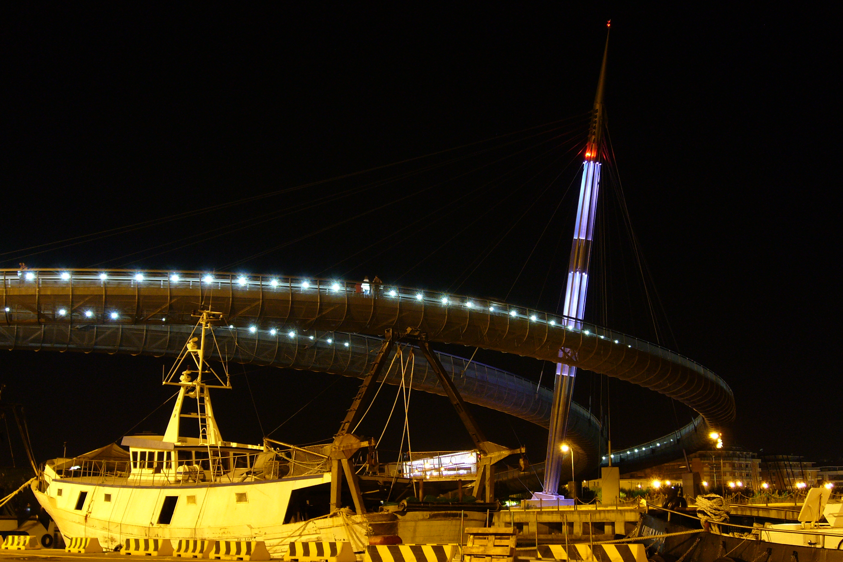 Pescara Ponte sul mare di notte